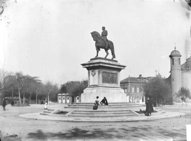 Vista de conjunt del monument; a les escales, asseguts, dos nens.